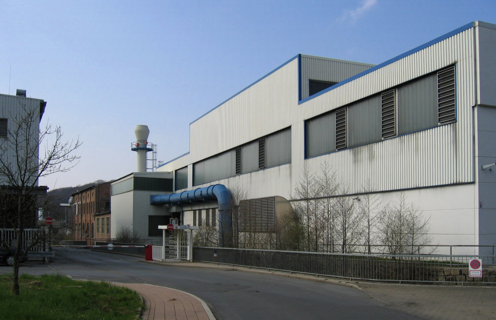 Description: Fabrikgebäude des Sundwiger Messingwerks in Hemer Source: selbst fotografiert Date: 24. Apr. 2006 Author: Bubo